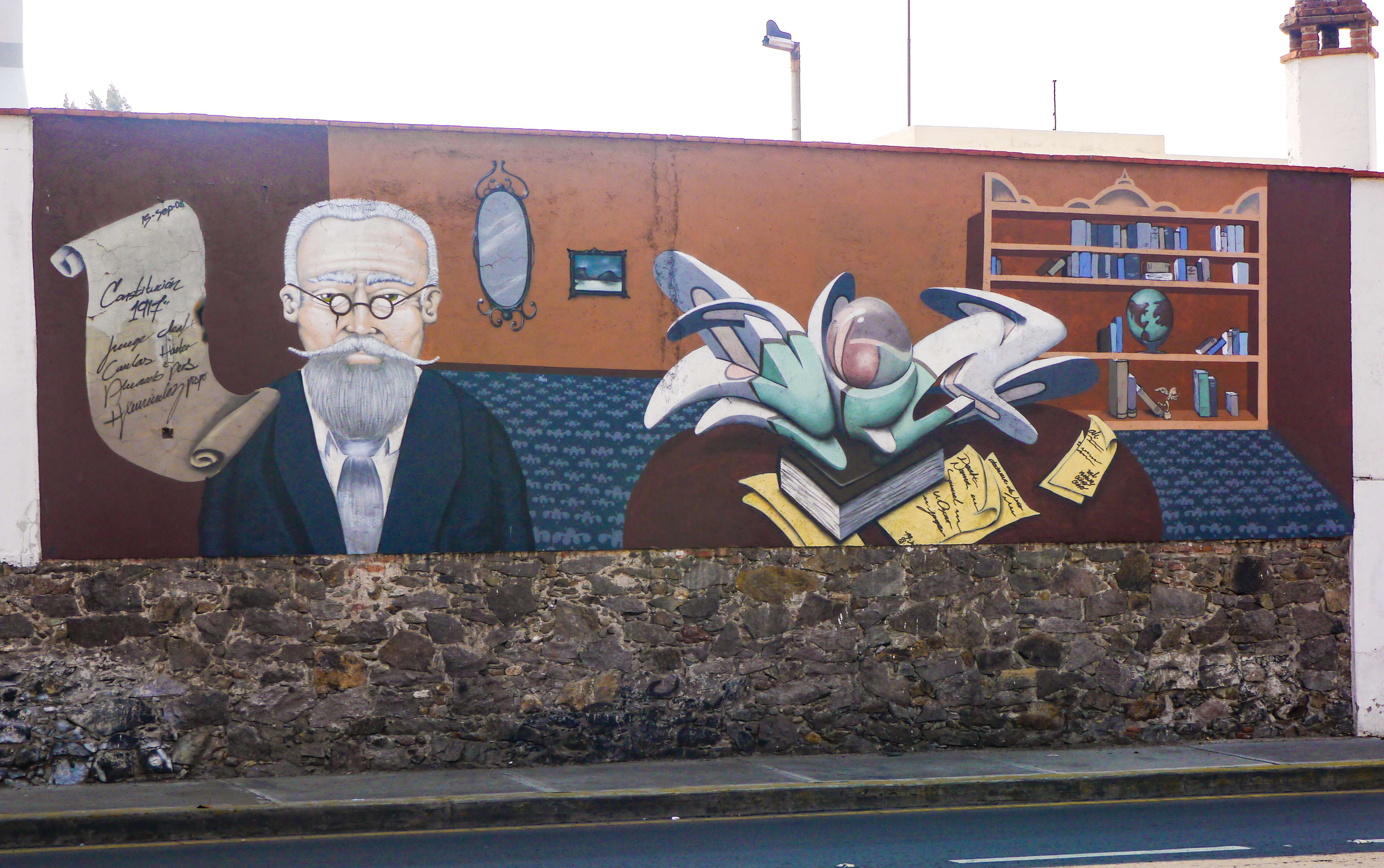 Mural de la constitución de 1917 en el Centro Histórico de Pachuca en Hidalgo, México.